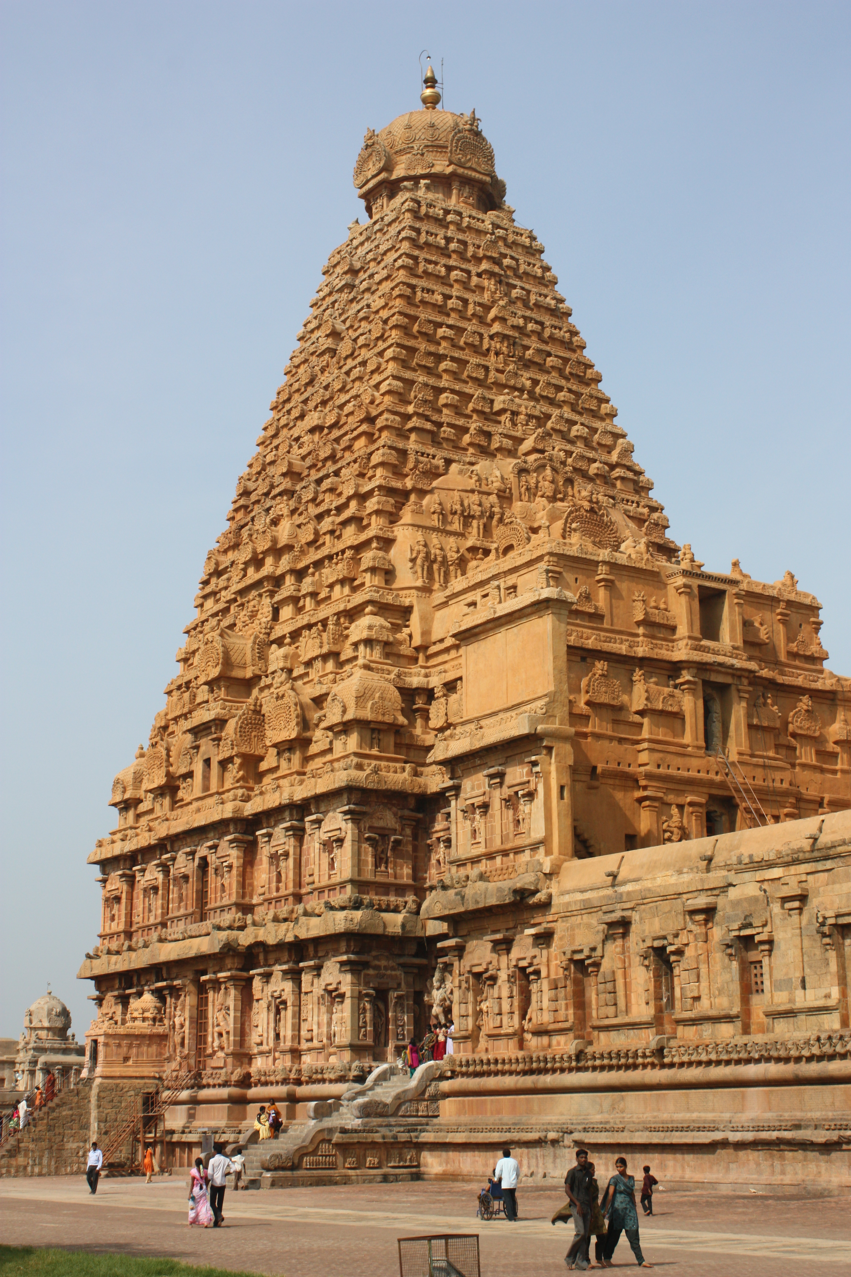 Thanjavur, Brihadishwara Temple